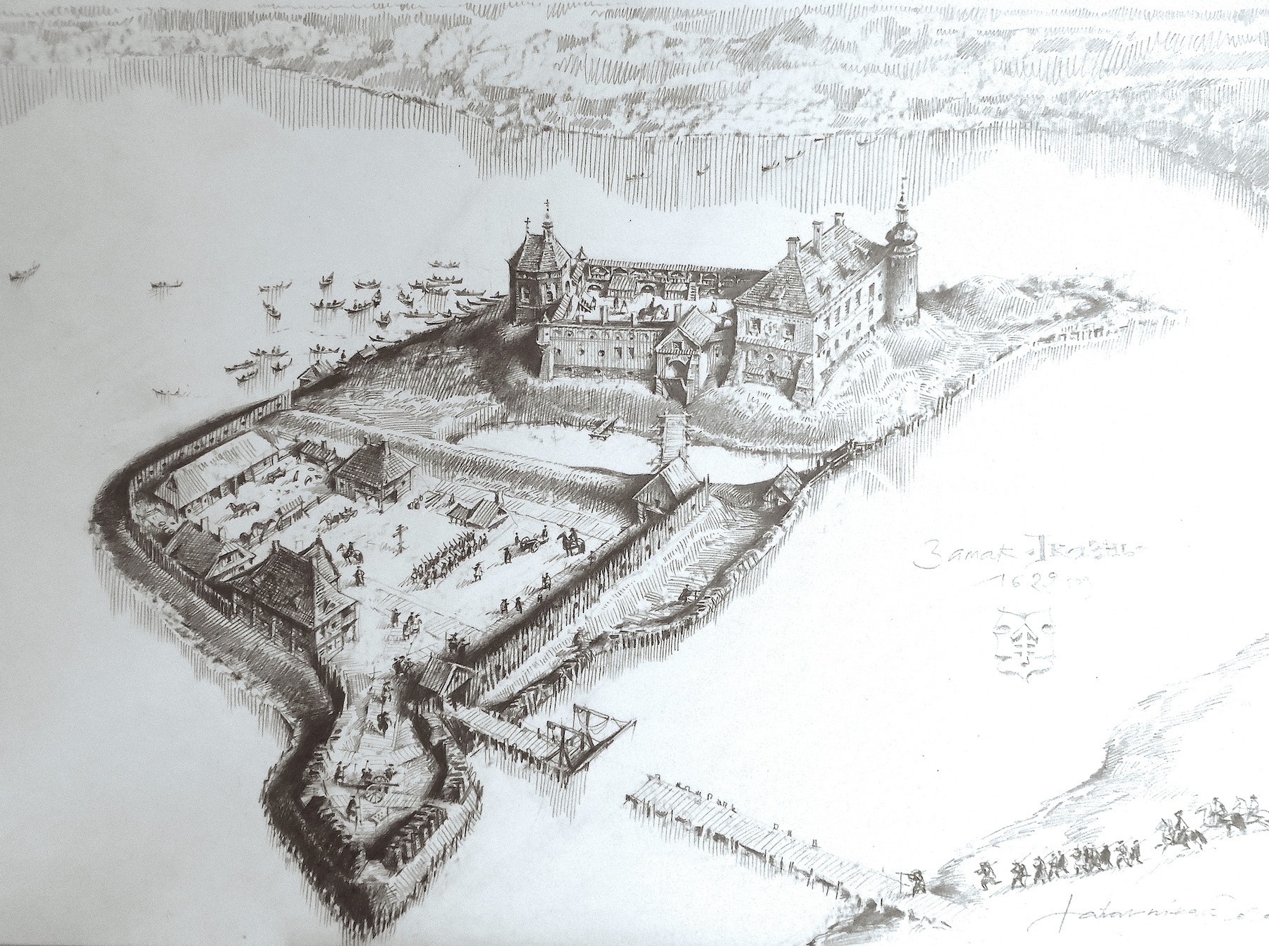 Замак Іказнь, Замак і падзамча. 1629. Перабудова Яна Станіслава Сапегі. Мастацкая рэканструкцыя П. Татарнікава па натхняльнай прапанове Алеся Краўцэвіча і матэрыялах М. Ткачова і М. Волкава.